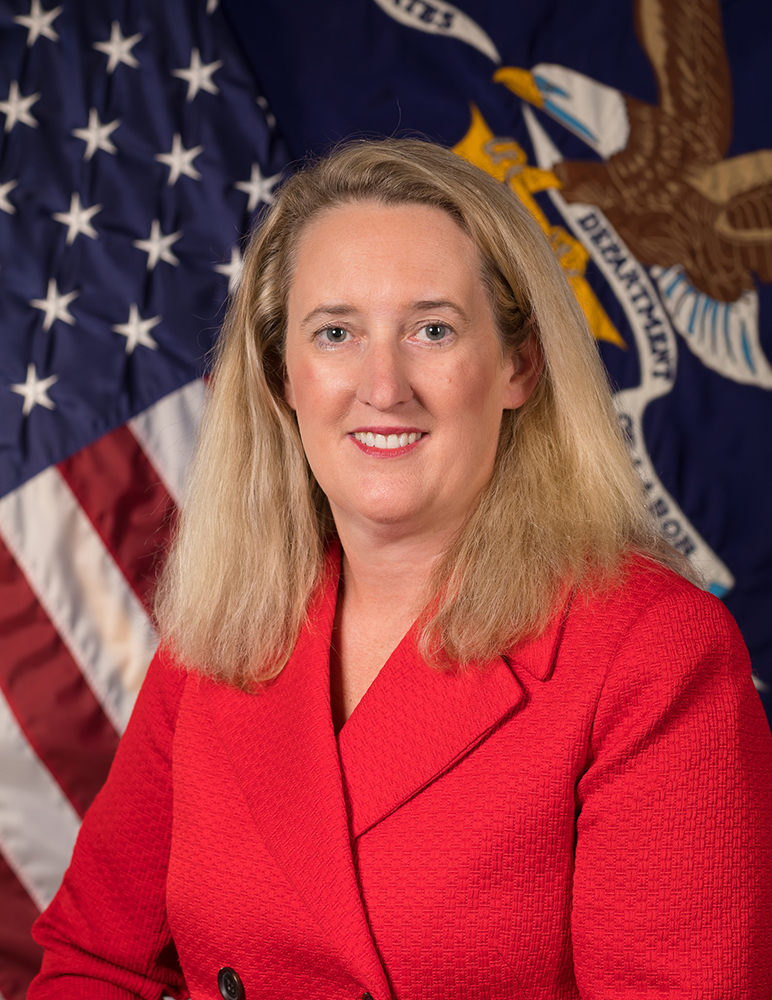 Лорен Свит, руководитель Управления по охране труда (в Минтруда США)